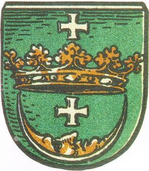 Herb Starogardu Gdańskiego z połowy XIV wieku.